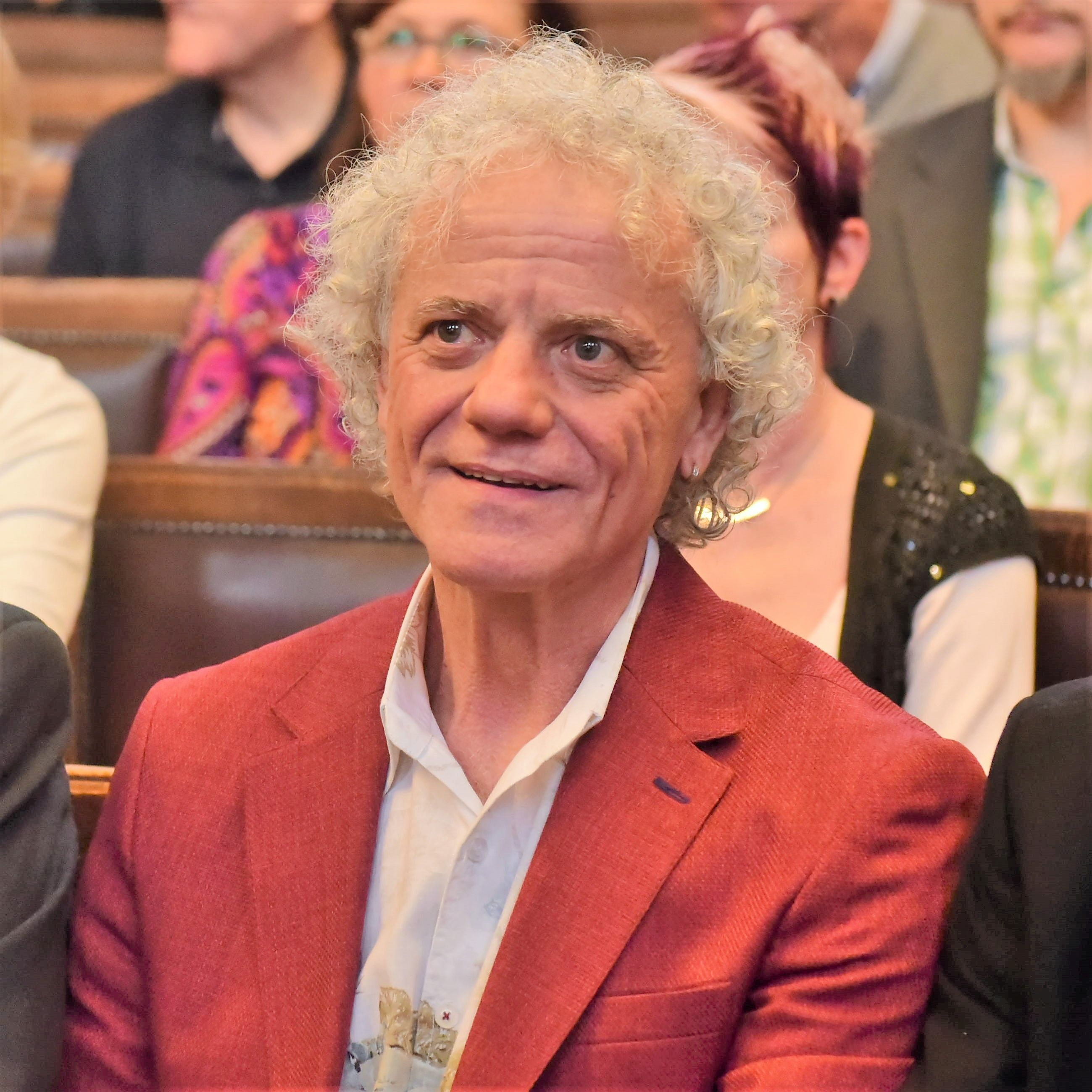 Gergely Gábor világbajnok magyar asztaliteniszező